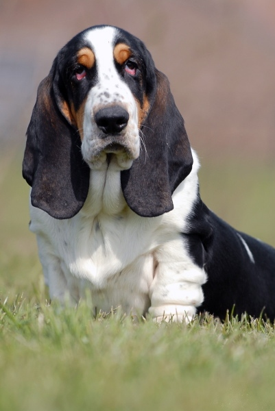 Basset Hound, black & tan Categorie:Afbeelding hond